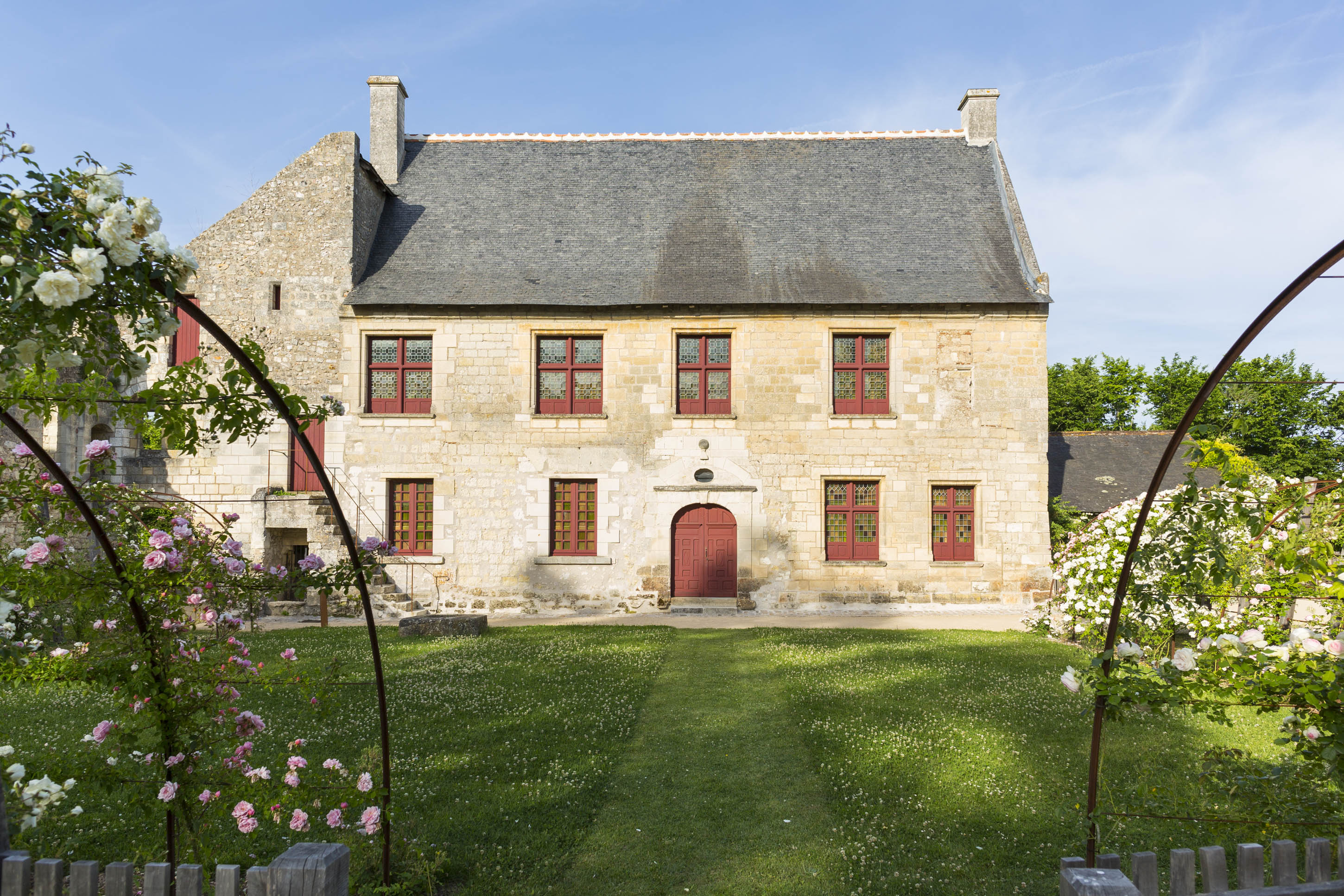 Logis de Pierre de Ronsard construit en 1348, le poète y a vécu et y est mort en 1585